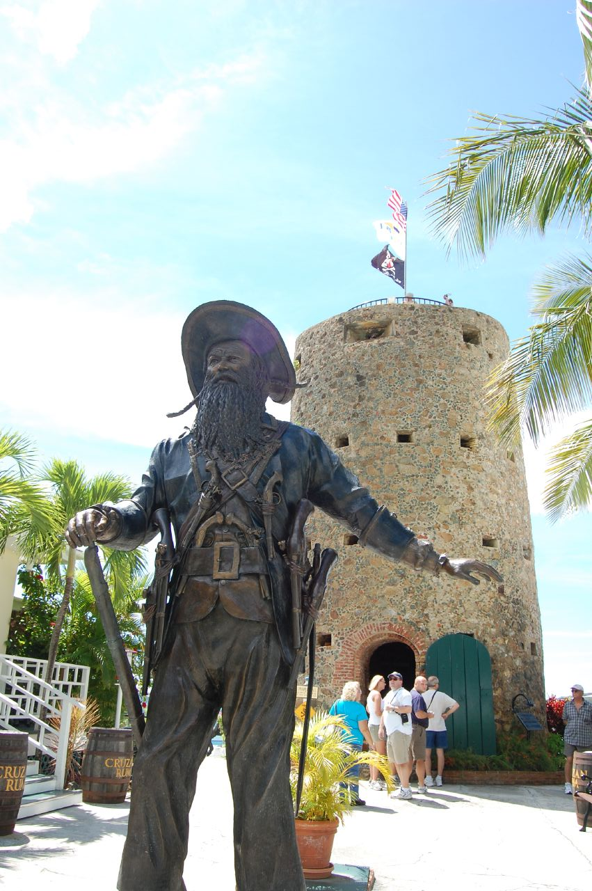 Statue de Barbe Noire (Blackbeard) devant le château de Barbe Noire (Blackbeard's Castle).